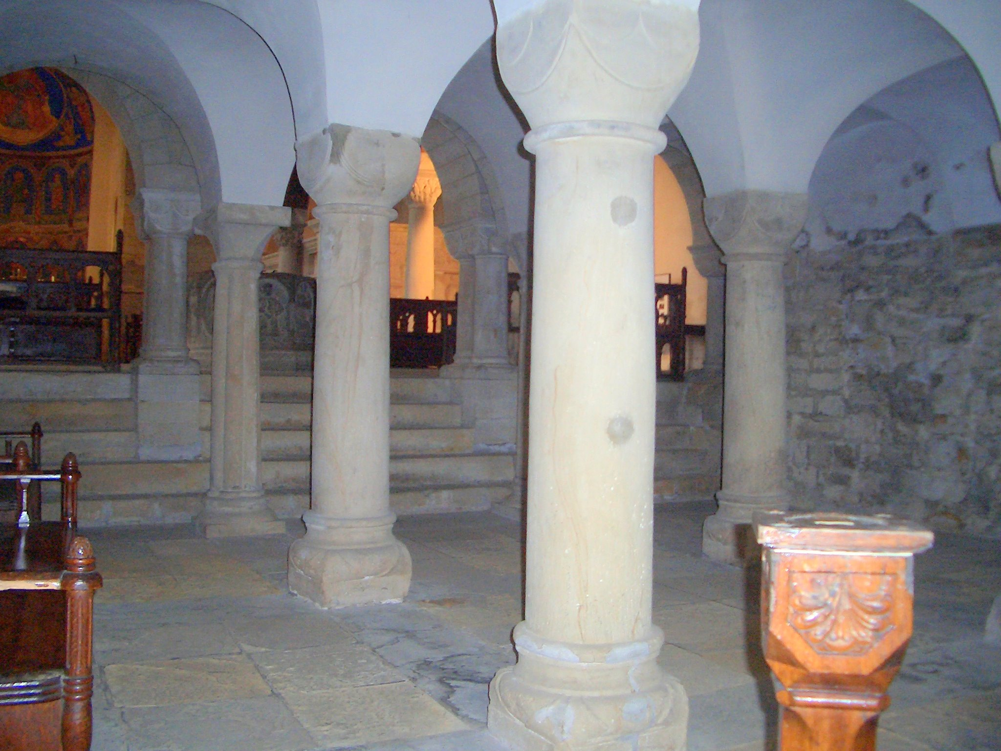 St. Cyriacus, západní krypta.